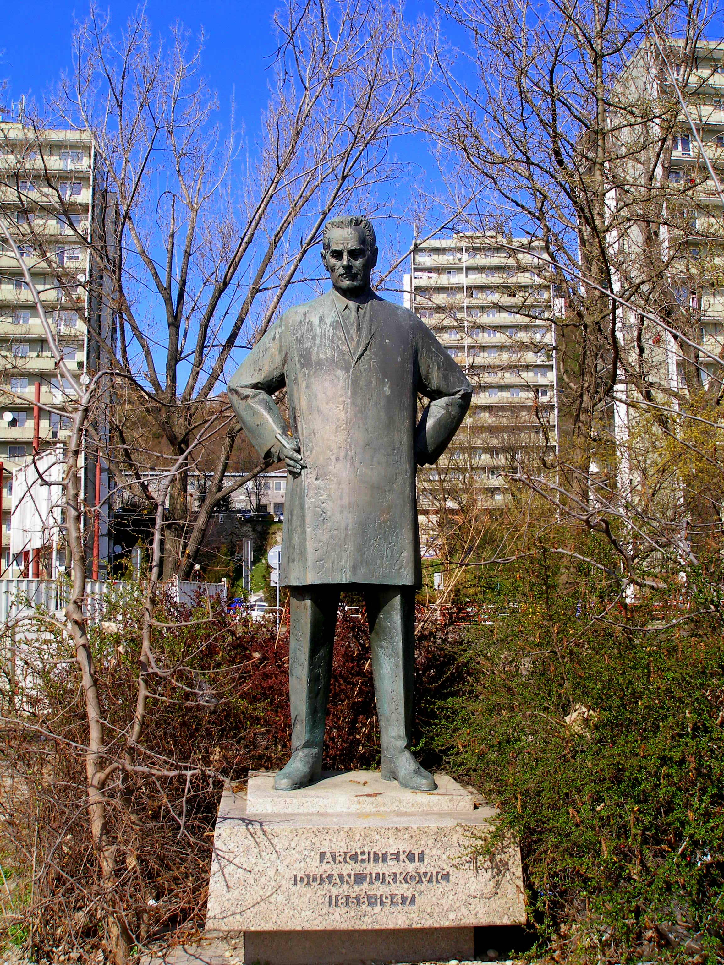 Bratislava Dvořákovo nábrežie. Autorom bronzovej sochy slovenského architekta Dušana Jurkoviča bol v roku 1971 Ladislav Snopek